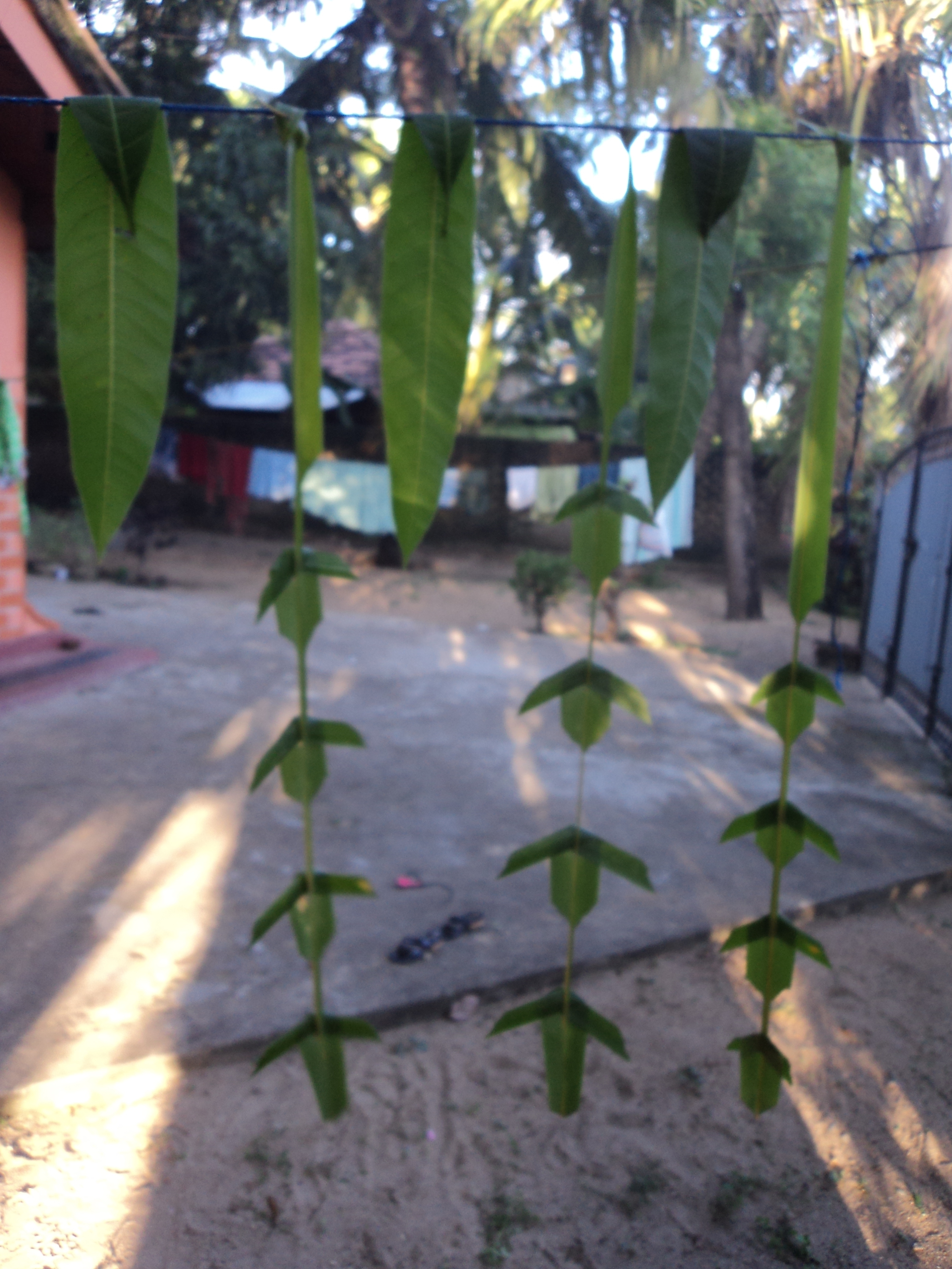 தோரணத்துடன் மாவிலைகளையும் சேர்த்துக் கட்டுவது மாவிலை தோரணம் எனப்படும்.